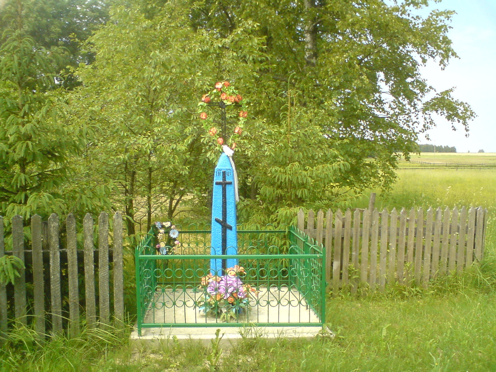 Krzyż w Radźkach